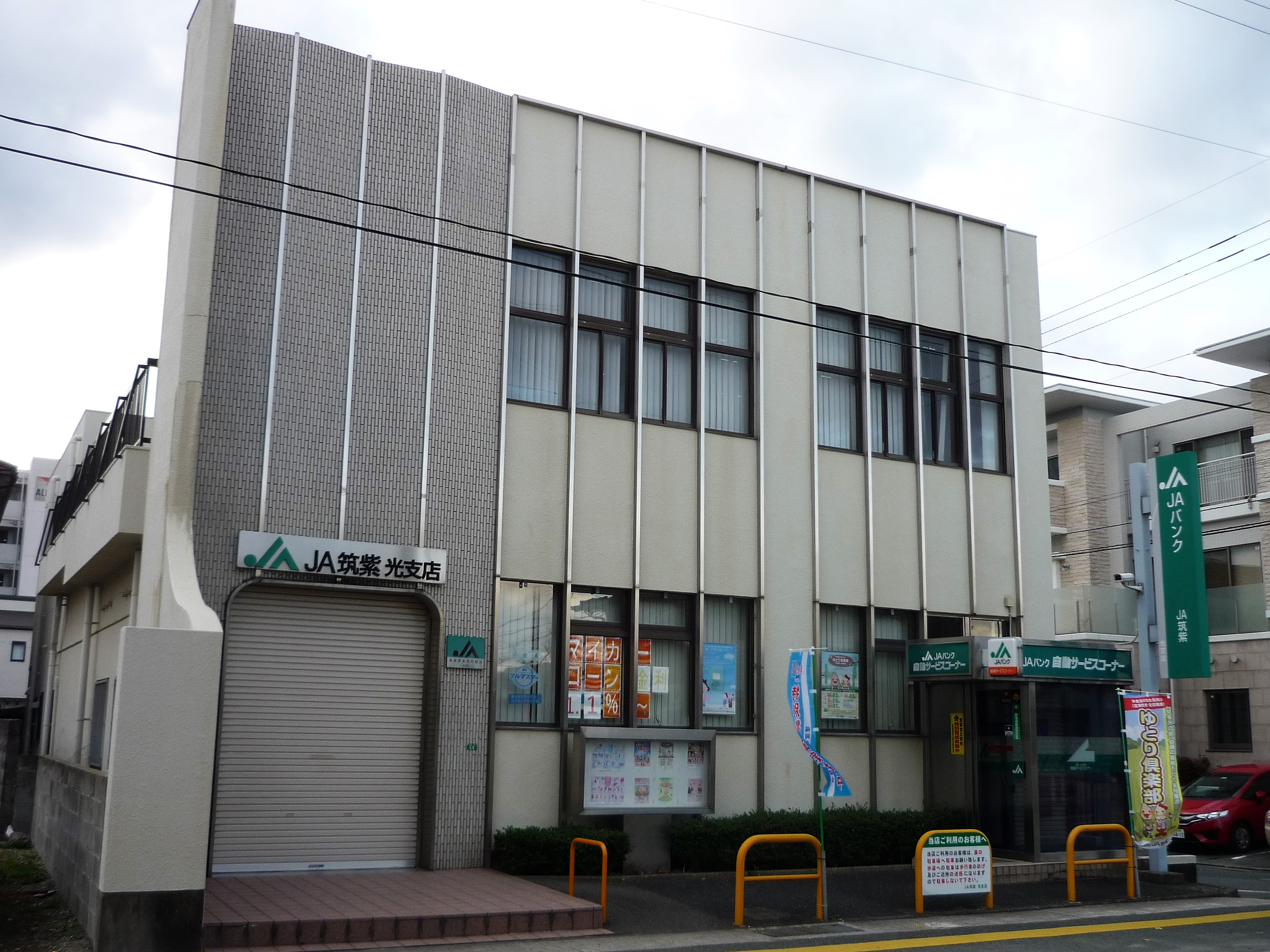 筑紫農業協同組合 光支店（春日市光町） Panasonic Lumix DMC-FS3